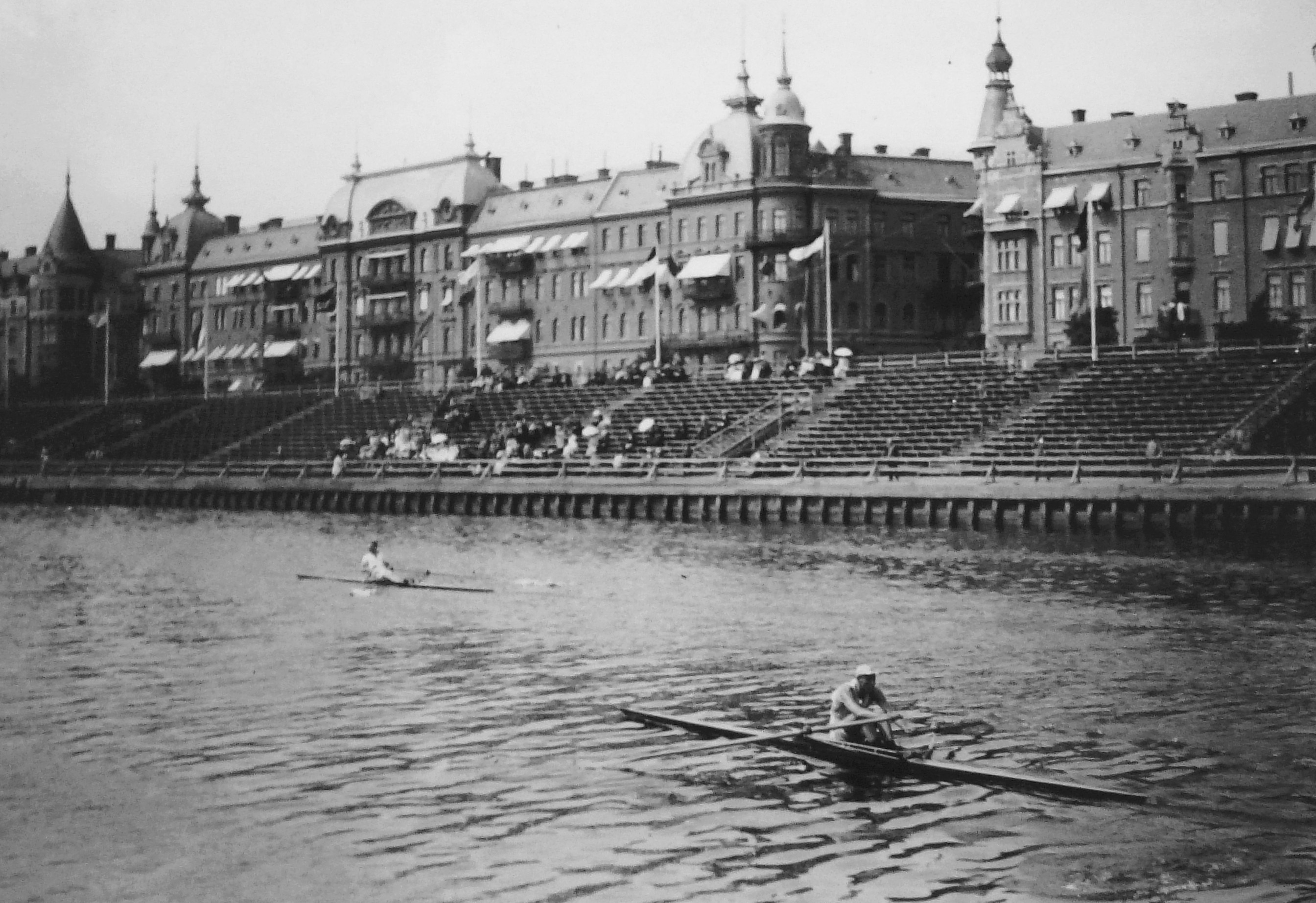 Roddtävling i singlesculler nedanför Strandvägen 1912